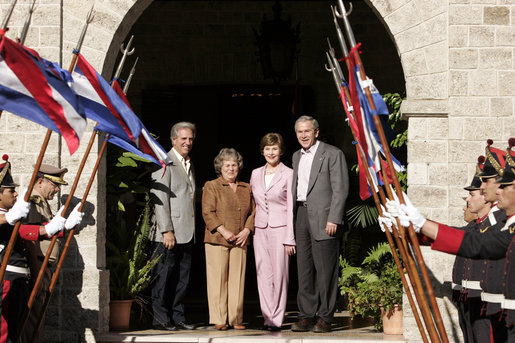 Bushes_vazquezs.jpg